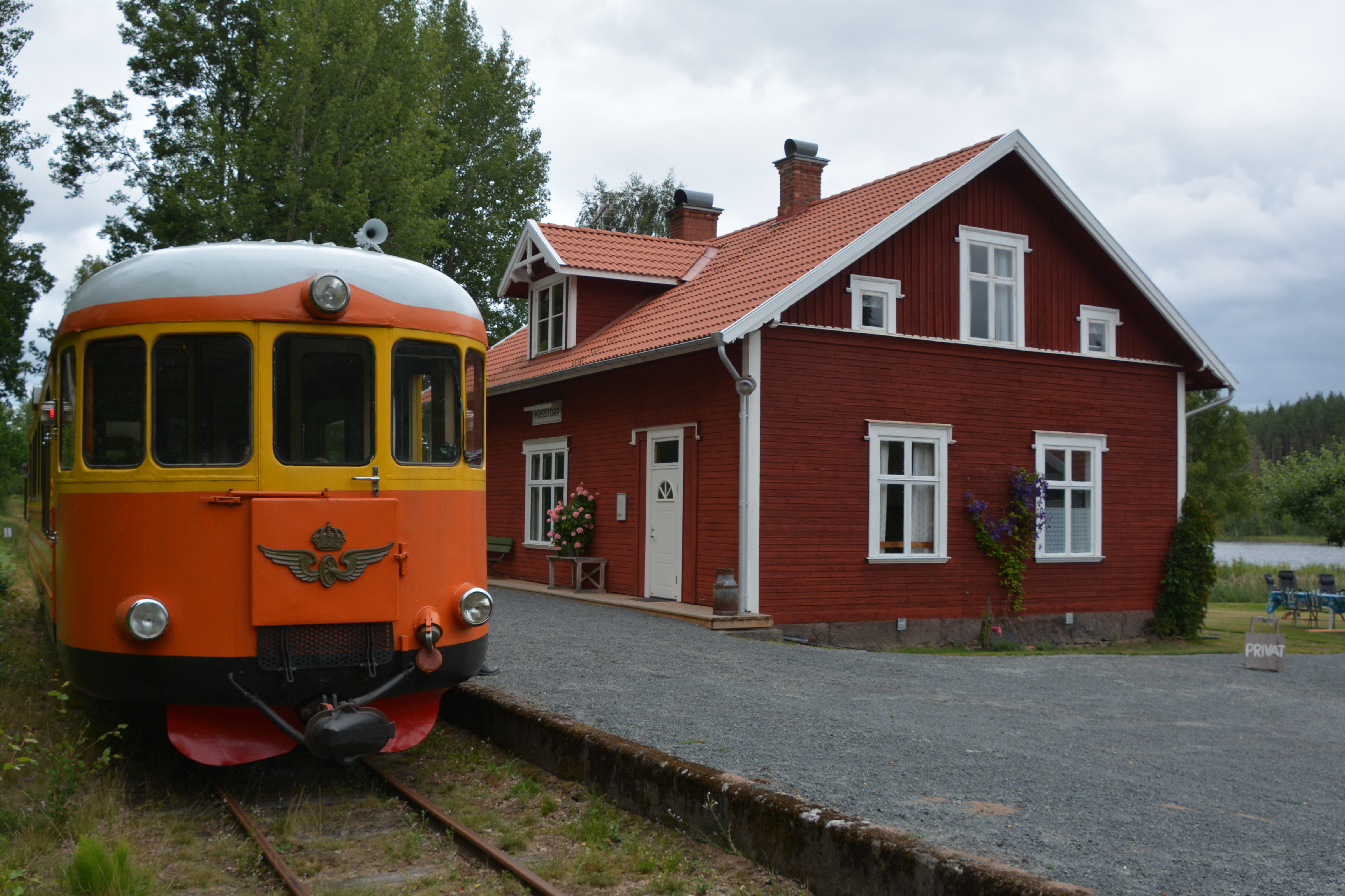 Mosstorps station